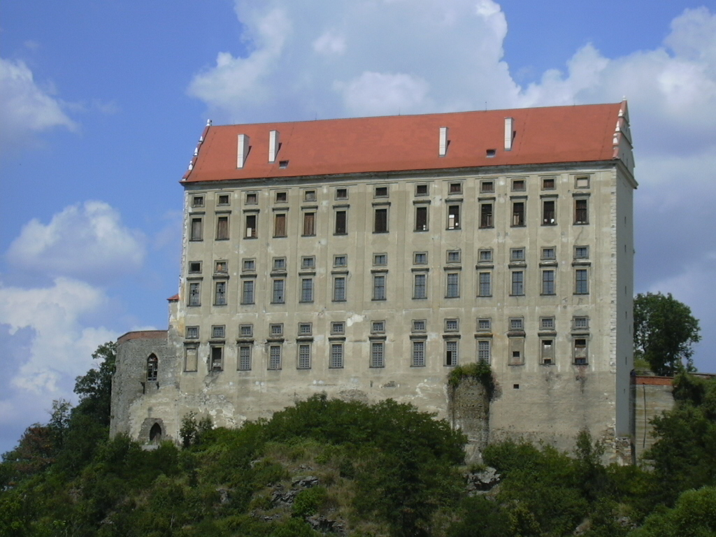 Zámek Plumlov, Czech Republic